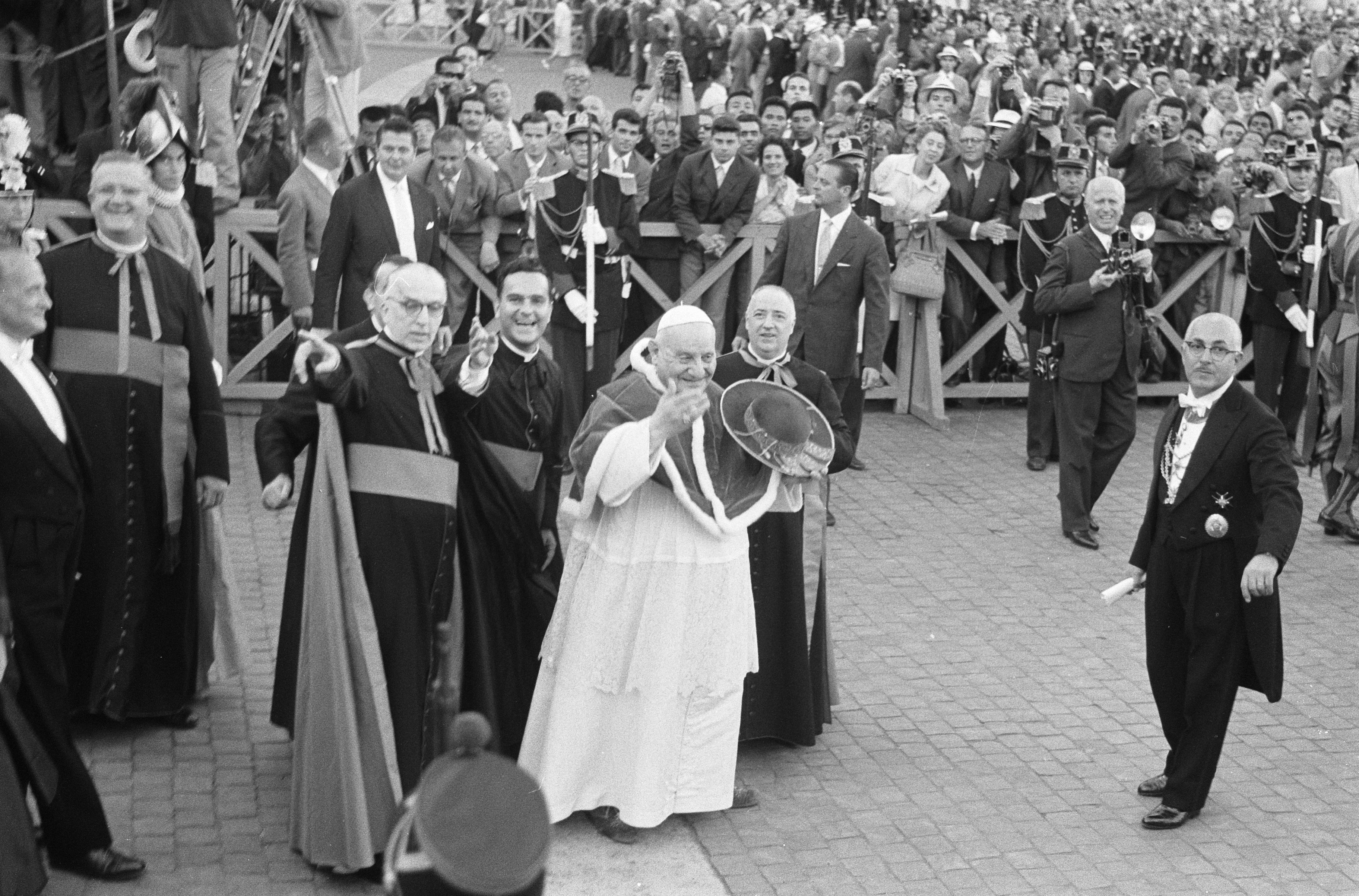 Collectie / Archief : Fotocollectie Anefo Reportage / Serie : [ onbekend ] Beschrijving : Olympische Spelen te Rome, Paus Johannes XXIII zegent de deelnemers aan de Spelen Datum : 28 augustus 1960 Locatie : Rome, Vaticaanstad Trefwoorden : pausen Persoonsnaam : Johannes XXIII (paus) Fotograaf : Pot, Harry / Anefo Auteursrechthebbende : Nationaal Archief Materiaalsoort : Negatief (zwart/wit) Nummer archiefinventaris : bekijk toegang 2.24.01.05 Bestanddeelnummer : 911-5392